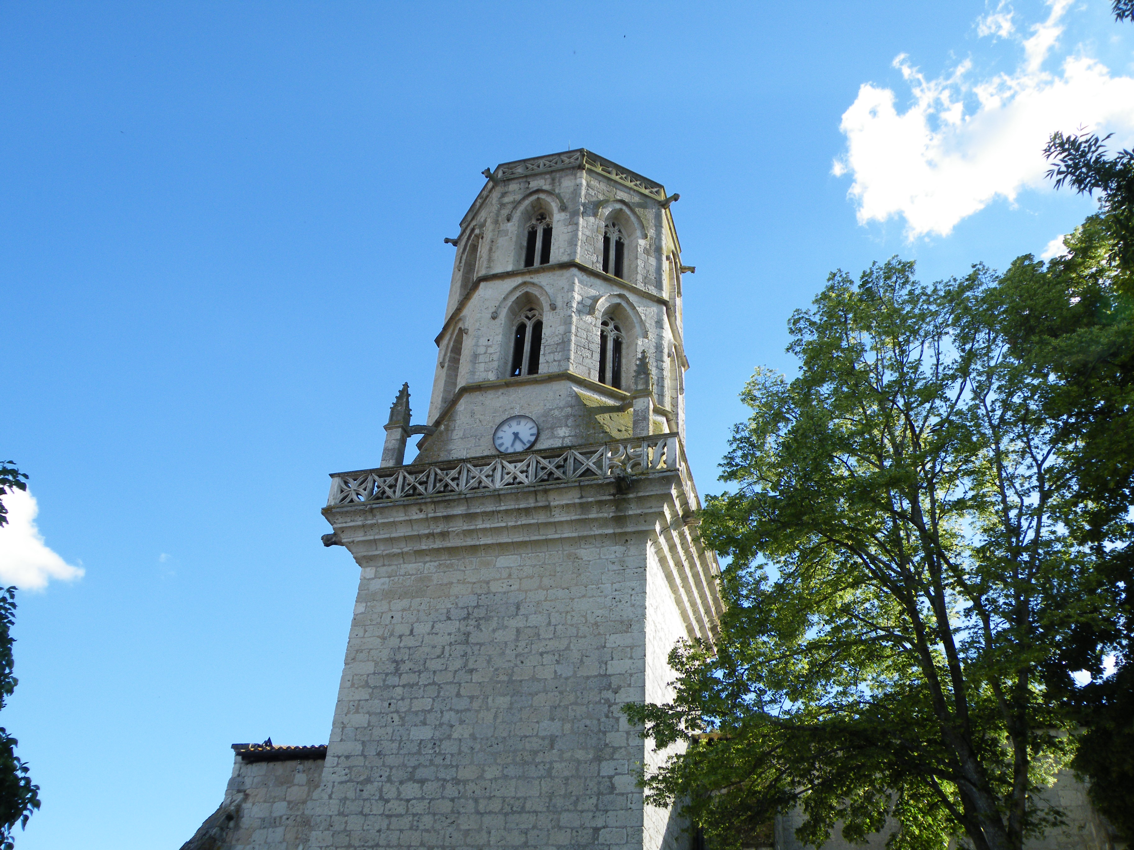 Église de Larrazet (Tarn-et-Garonne) .